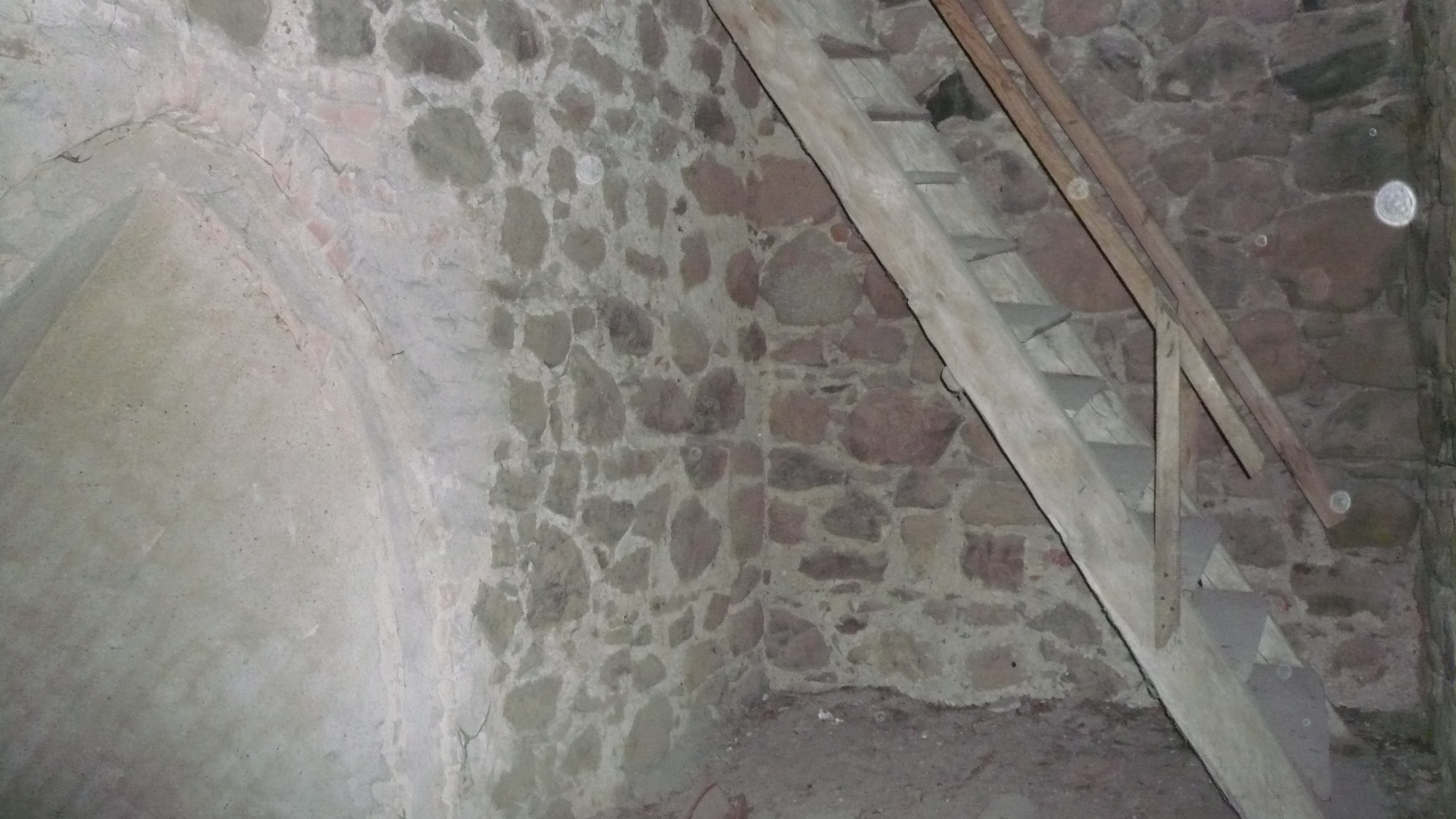 Dolsko - rzymskokatolicki kościół filialny p.w. św. Elżbiety, 2 poł. XIII (widok części wnętrza I piętra wieży kościoła, widoczne schody drewniane na II piętro)